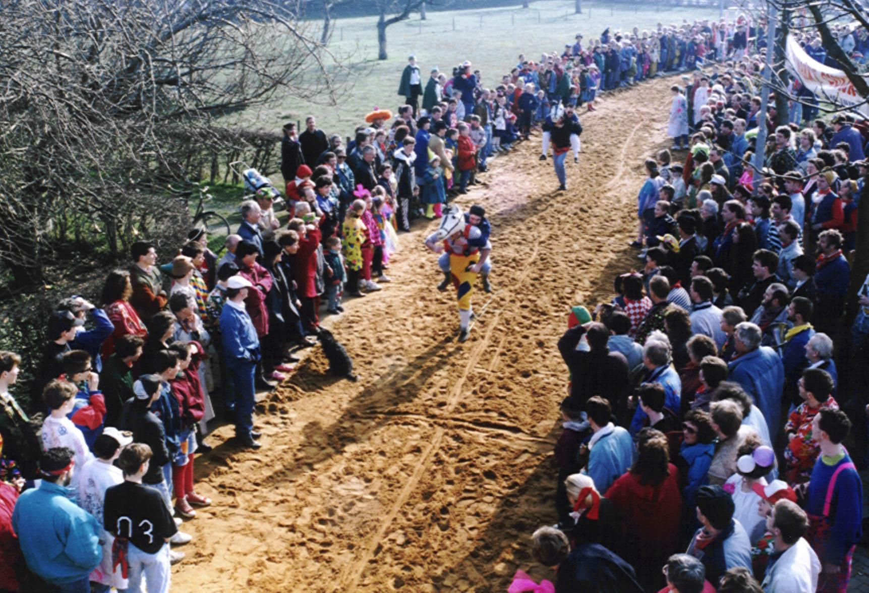 Overzichtsfoto van De Knakworstrennen in 1992.